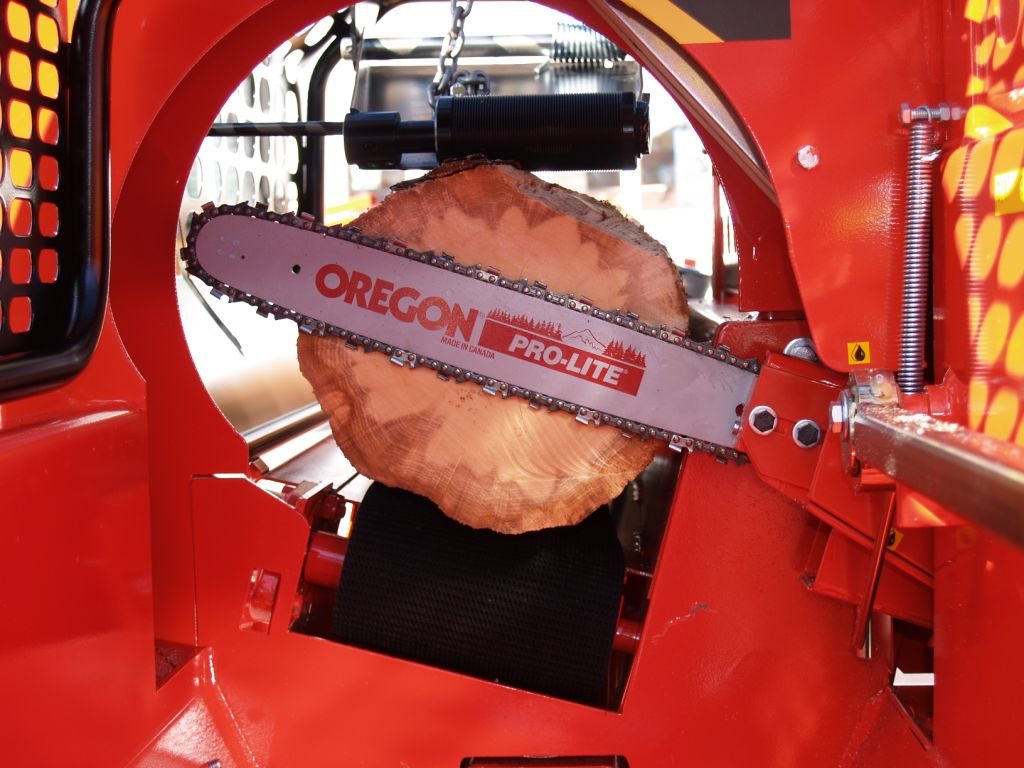 Spaltkanal mit Motorsäge Oregon pro-lite